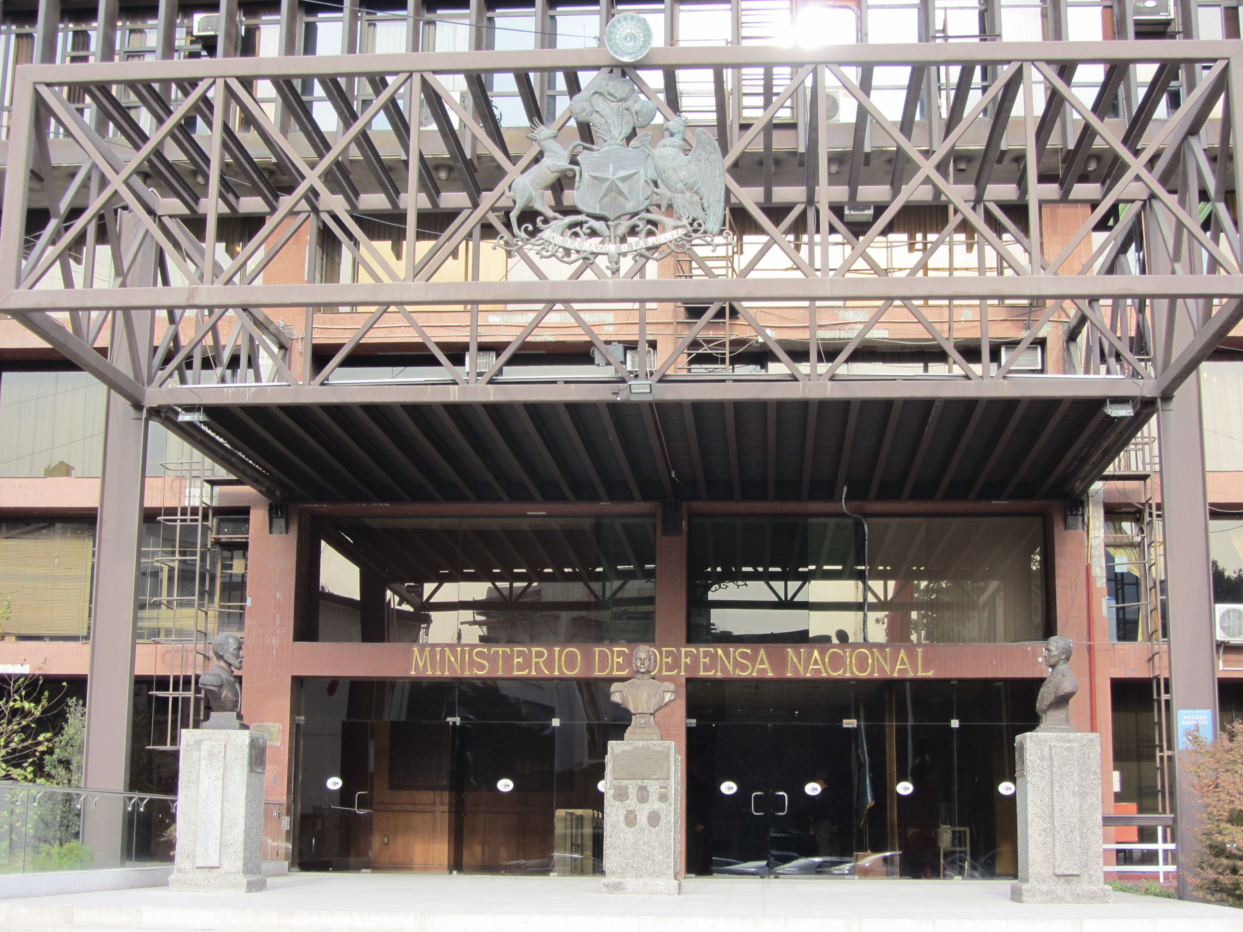 Entrada al edificio Diego Portales, cuando aún pertenecía al Ministerio de Defensa de Chile. Los tres bustos corresponden a los de Arturo Prat (izquierda), Bernardo O'Higgins (centro) y Arturo Merino Benítez (derecha)